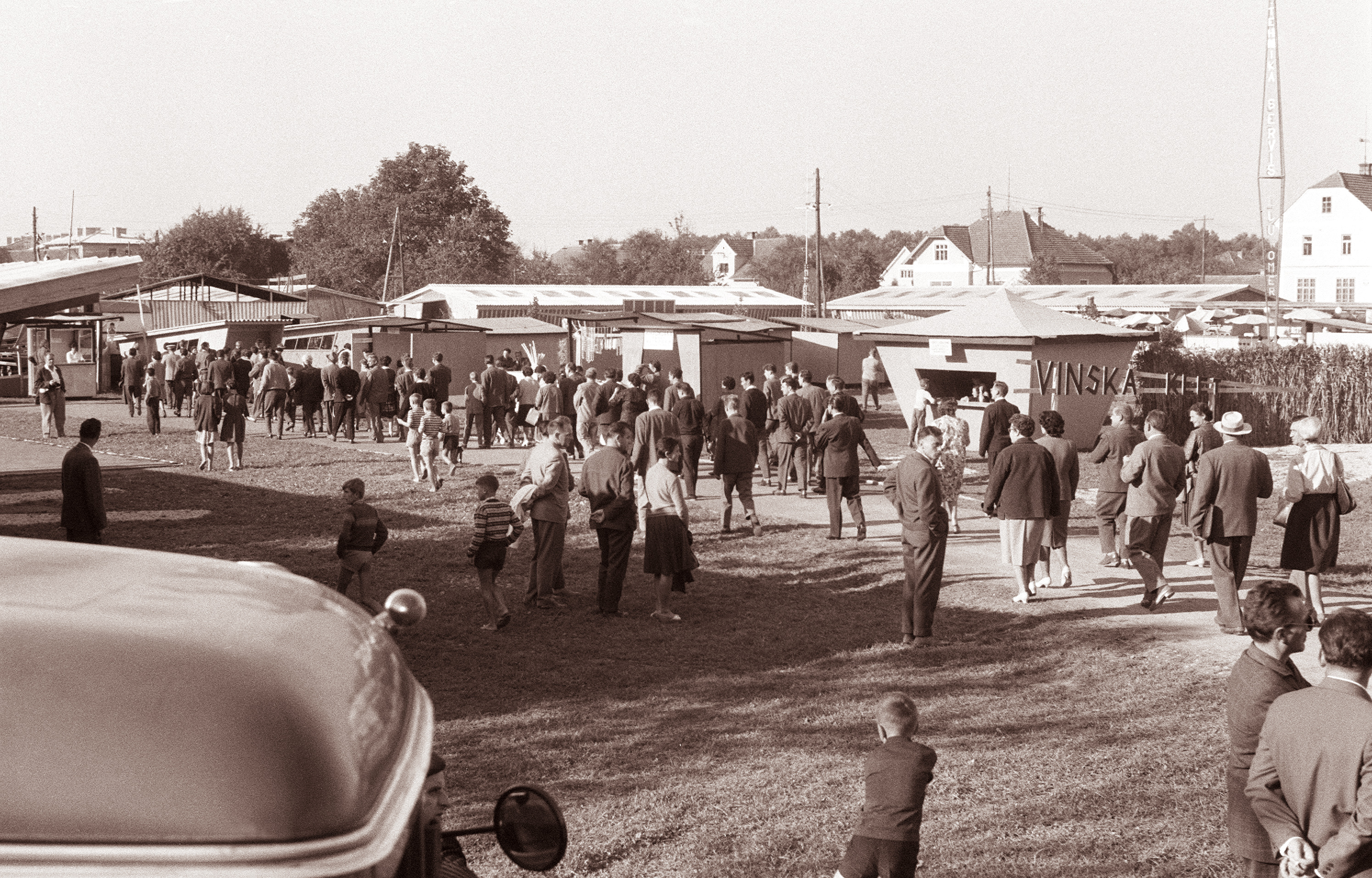 Pomurski sejem v Gornji Radgoni